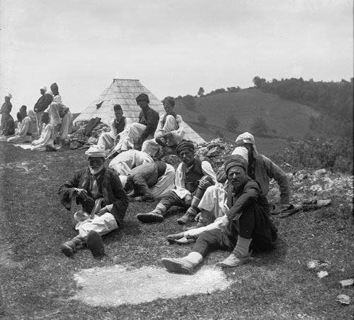 Bosna, motlitba